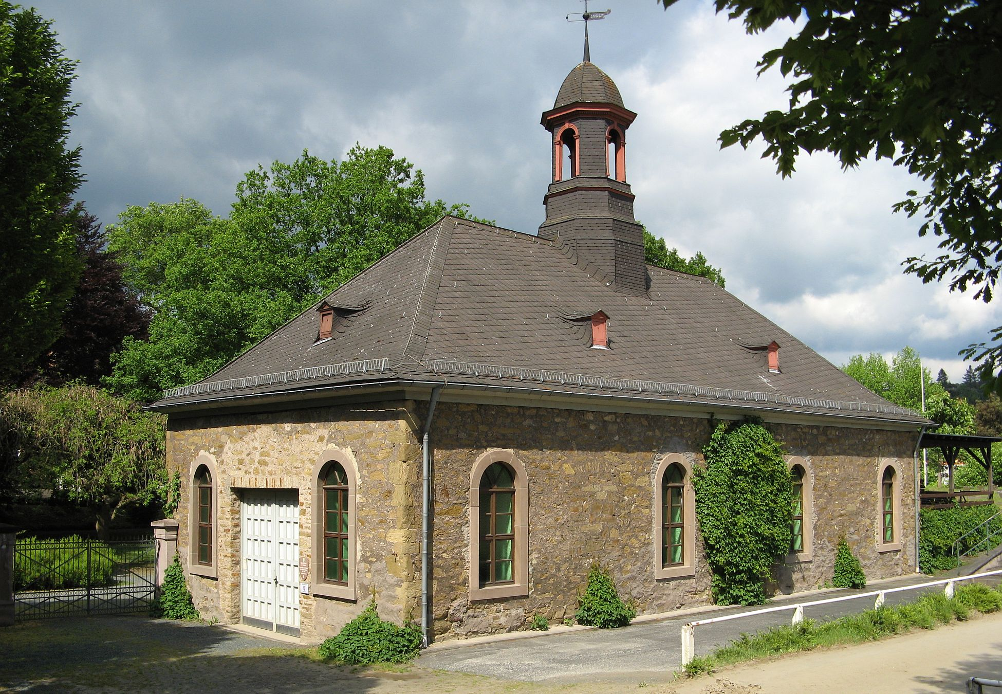 Die alte Orangerie in Dillenburg, ein Gebäude des hessischen Landgestüt , es dient heute als Kutschenmuseum